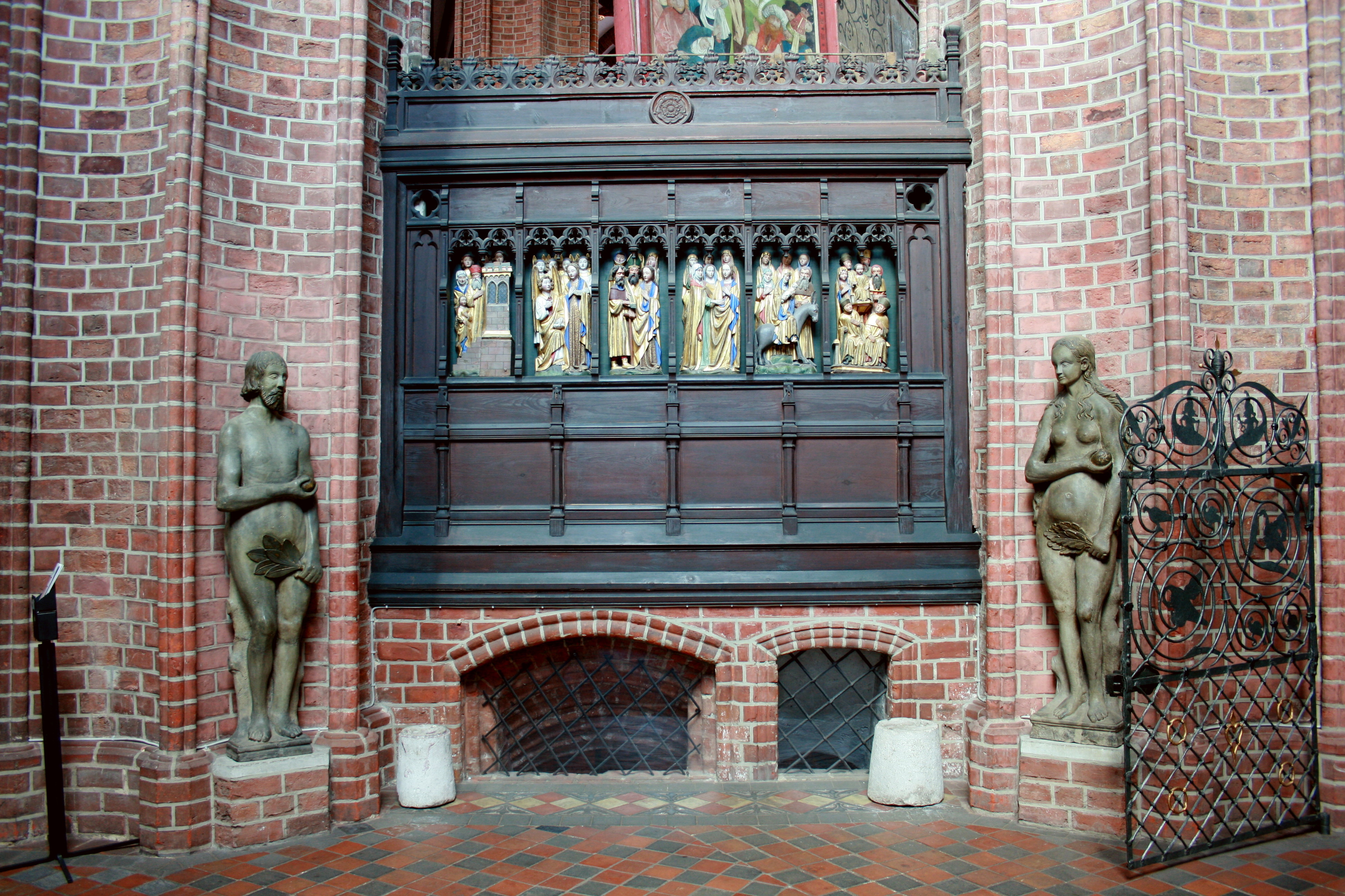 St. Nicolai in Lüneburg